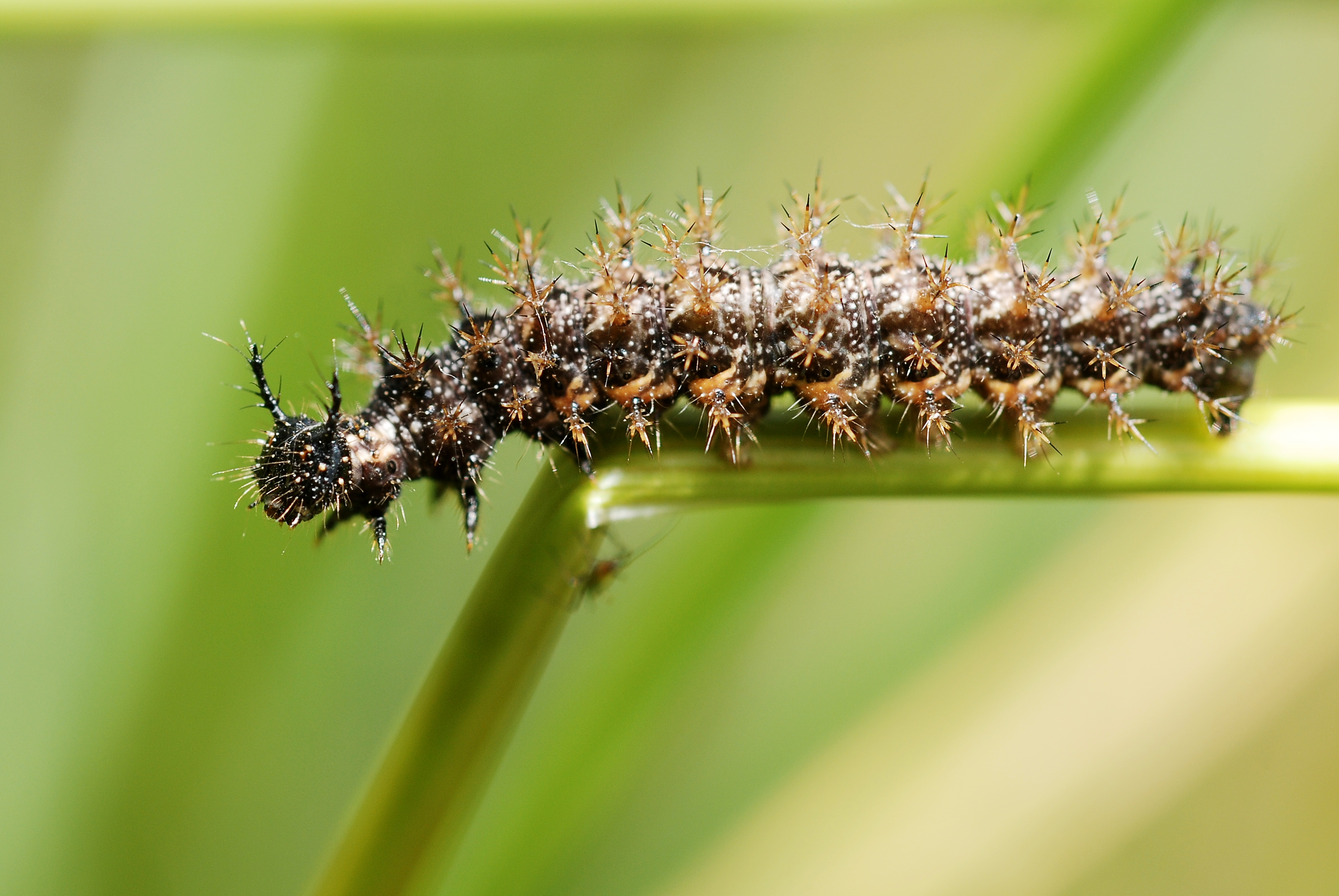 Araschnia levana caterpillar